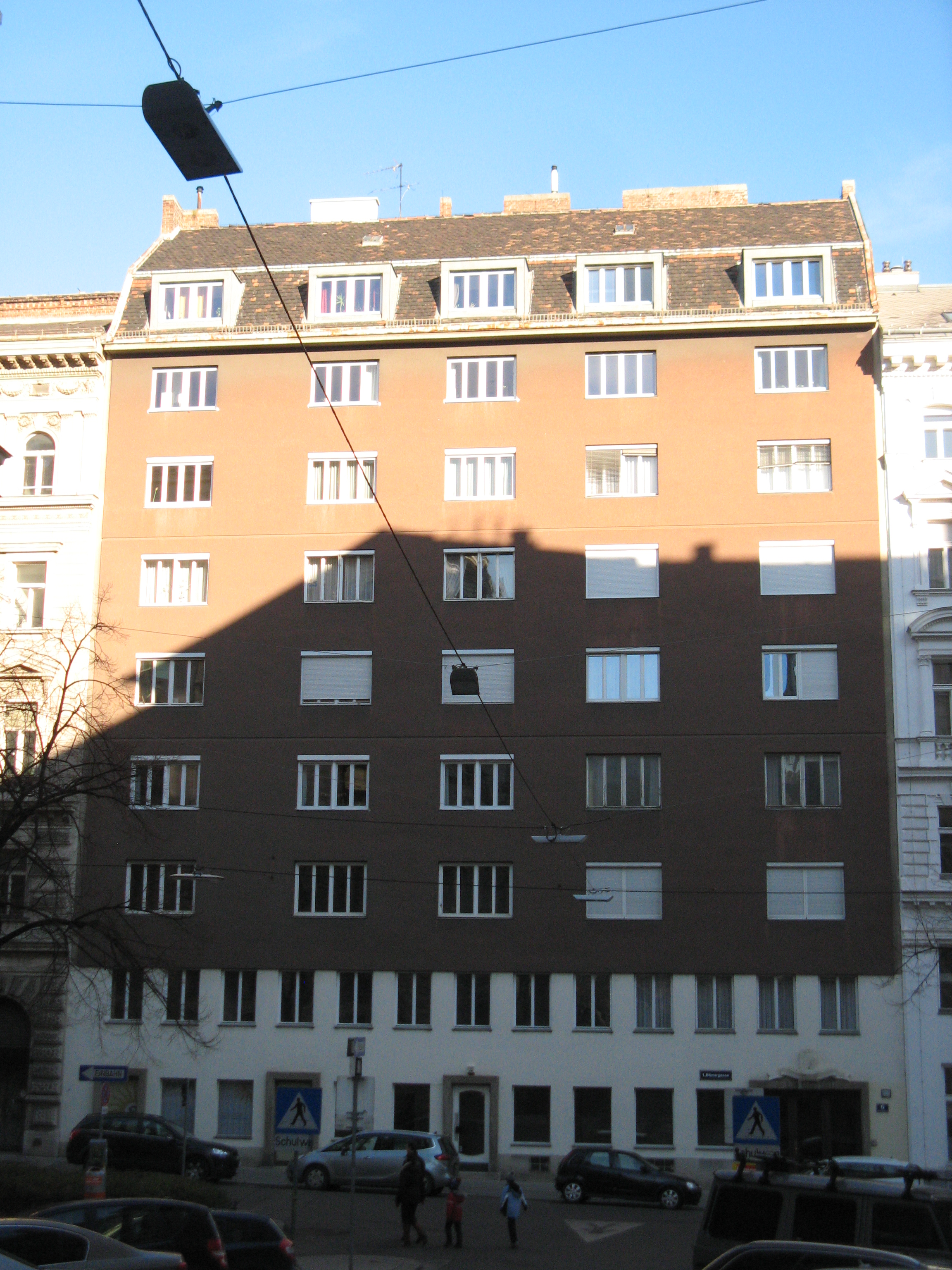 Haus Börsegasse Nr. 6 (1951-52) von Gustav Hoppe, Wien-Innere Stadt